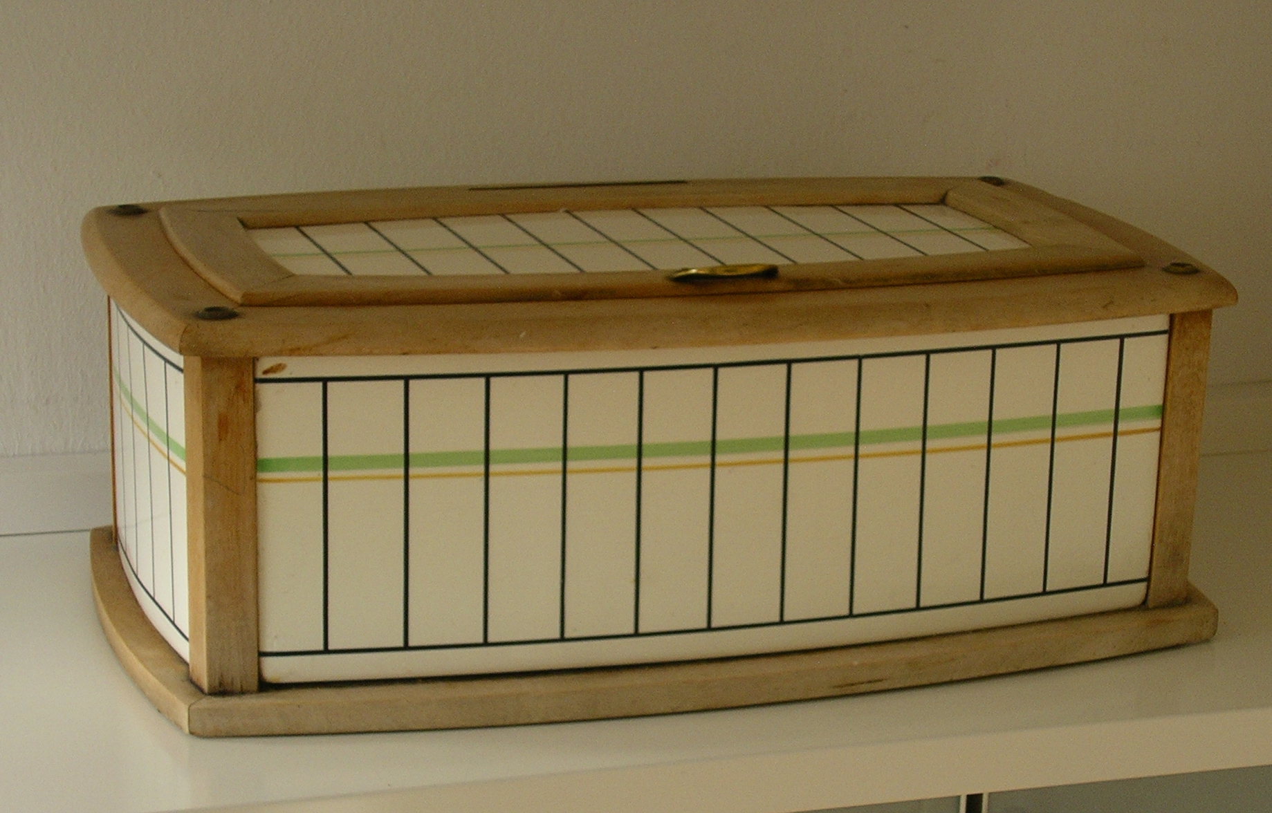 Brotkasten, Steingut und Holz, Waechtersbach, um 1910